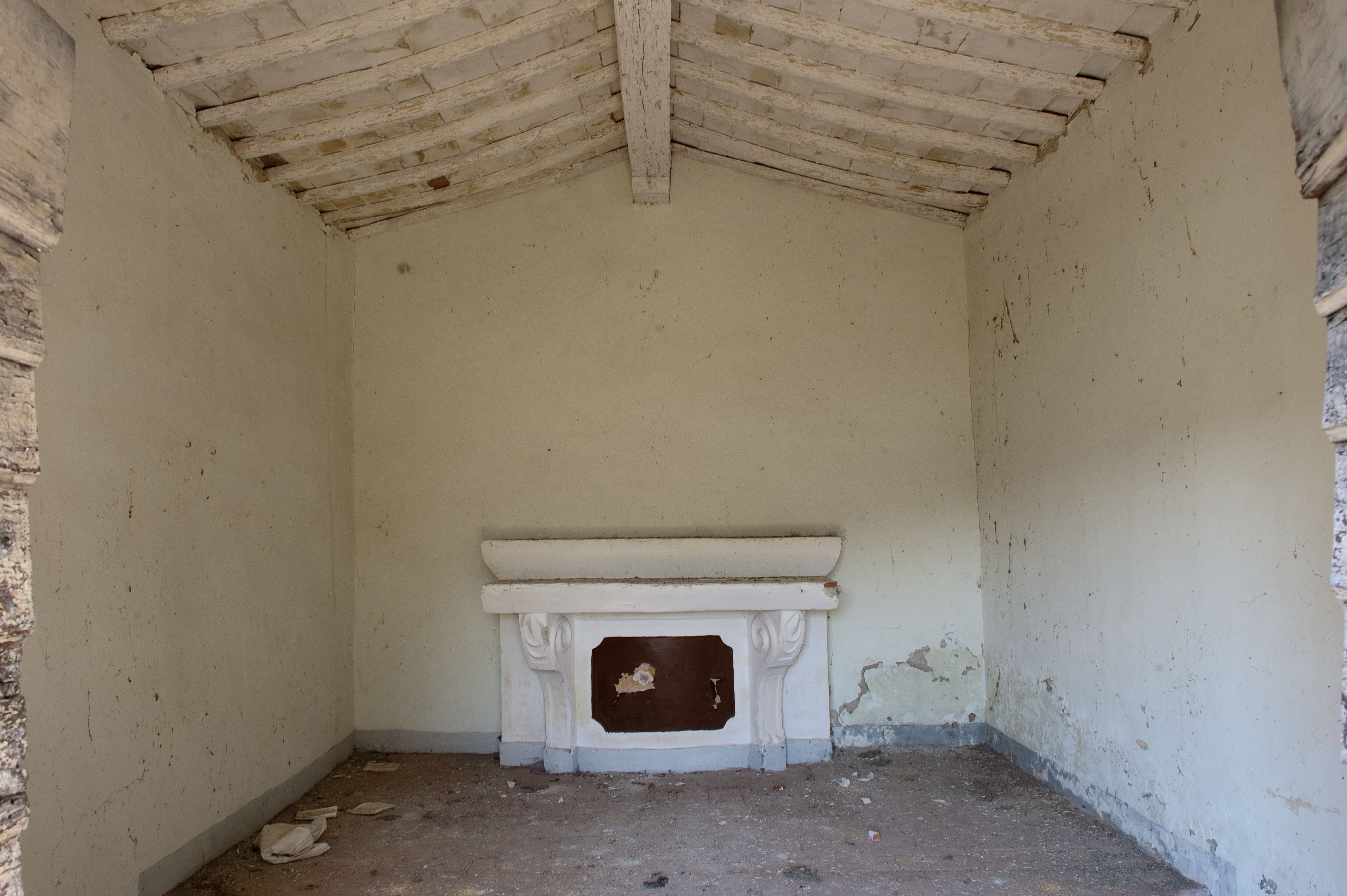 Interno della chiesa di san Paolo a San Polo (Tavarnelle Val di Pesa)